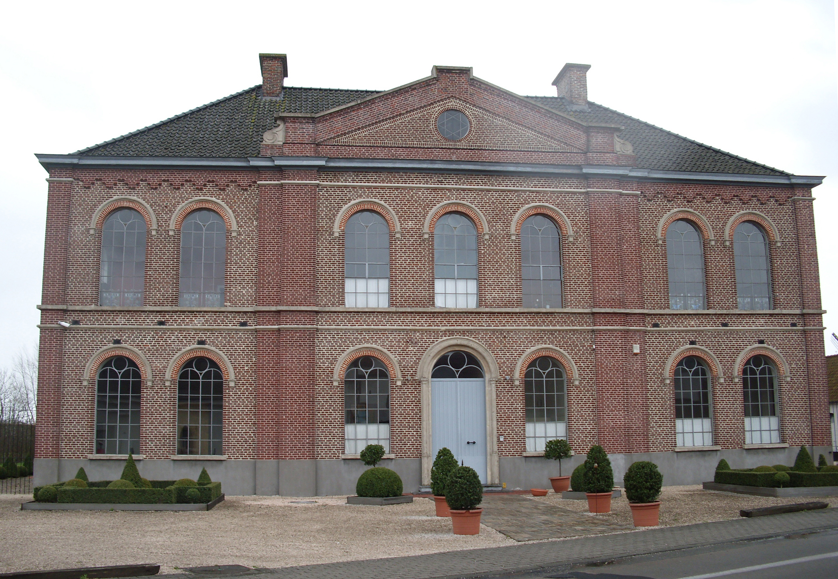 Vroegere Hof Gebrs.Vandenberghe - "Hospice" 1863 - Steenweg van Asper naar Zingem - Oost-Vlaanderen - Vlaanderen - België. Voormalig "Armhuis", gesticht door Sabina De Groote in 1863 en gebouwd n.o.v. architect E. de Perre-Montigny. Oorspronkelijk bestuurd door leken, sinds 1896 o.l.v. religieuzen van het H. Hart van Maria (van Nederbrakel). Tot 1927 dienst doende als bejaardentehuis.